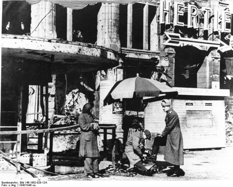 Ein russischer Offizier lässt sich am Dönhoffplatz vor dem ausgebombten Kaufhaus Hertie die Stiefel von einem Berliner putzen.